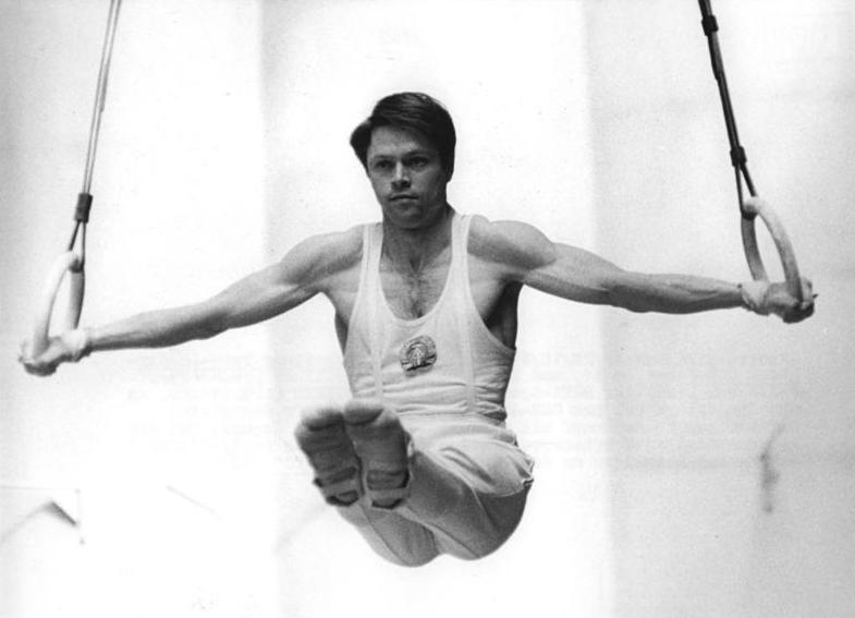 Matthias Brehme Zentralbild Schaar 20-10-69 Berlin: Vorbereitung Turn-Länderkampf DDR-Japan am 21. und 22.10.69 in der Berliner Dynamo-Sporthalle - Der Leipziger DHfK-Sportler Matthias Brehme (Archivfoto, an den Ringen) gehört zum DDR-Aufgebot der Männer für den ersten offiziellen Länderkampf mit den Weltklasseturnern Japans. Bei den internationalen Wettbewerben am letzten Wochenende in Ljubiljana siegte der Leipziger an den Ringen.